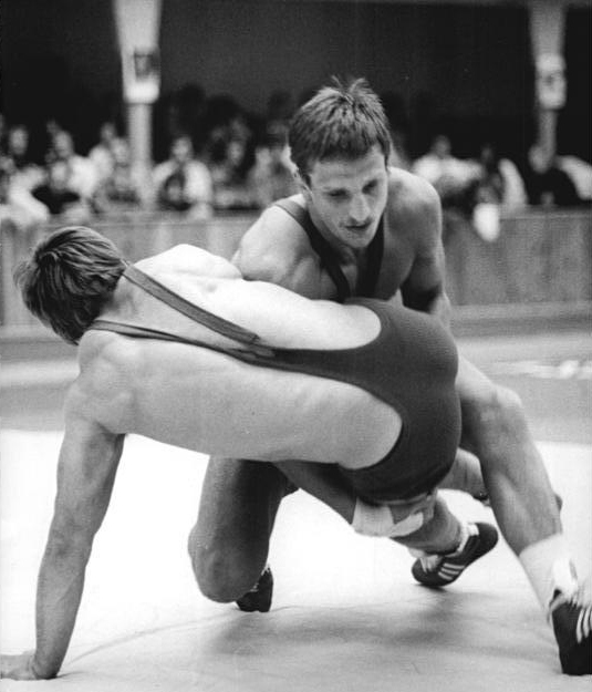 Uwe Neupert, Rüdiger Möhring ADN-ZB Lehmann 13.6.82-pe Halle: DDR-Meisterschaften im Freistilringen Den DDR-Meistertitel im Freistilringen erkämpfte sich in der 90-kg-Klasse souverän der EM-Silbermedaillengewinner von Warna Uwe Neupert aus Jena - hier im Finalkampf gegen Rüdiger Möhring aus Luckenwalde.